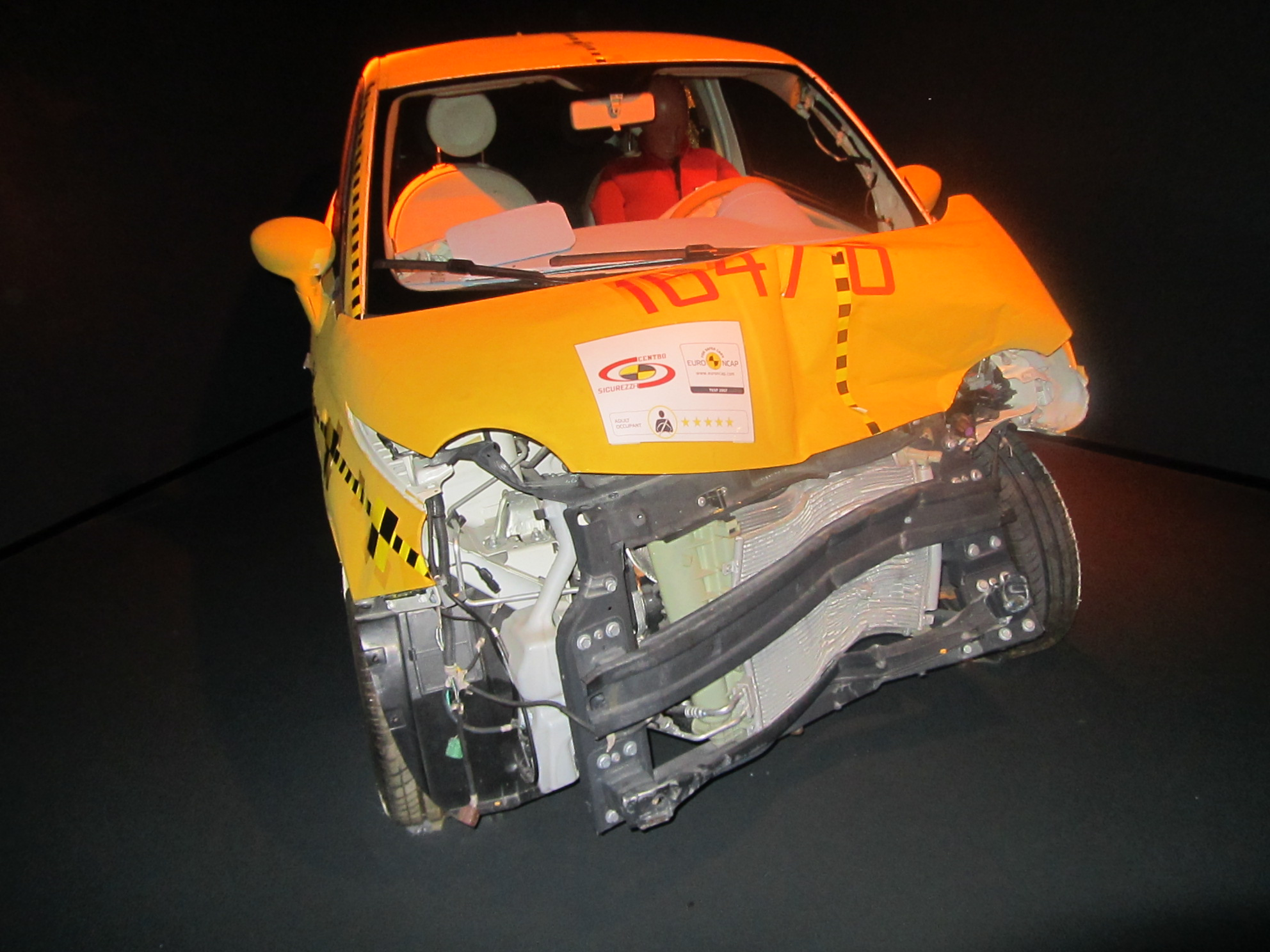 esposizione di una Fiat 500 sottoposta al crash test (5 stelle) presso il Museo Nazionale dell'Automobile di Torino